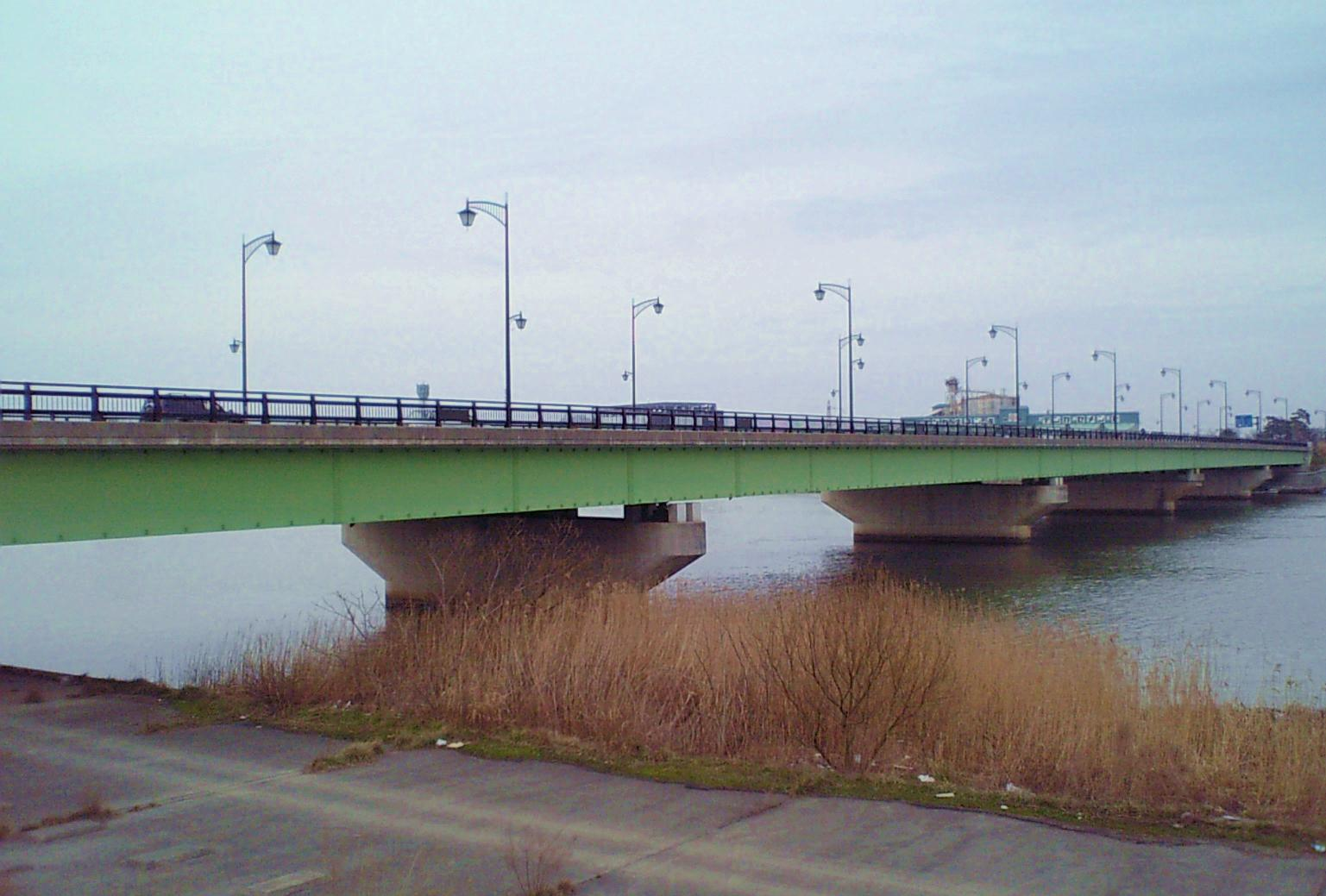 平成大橋。新潟県新潟市の信濃川に架かる国道116号（重複 : 国道289号）の道路橋梁。